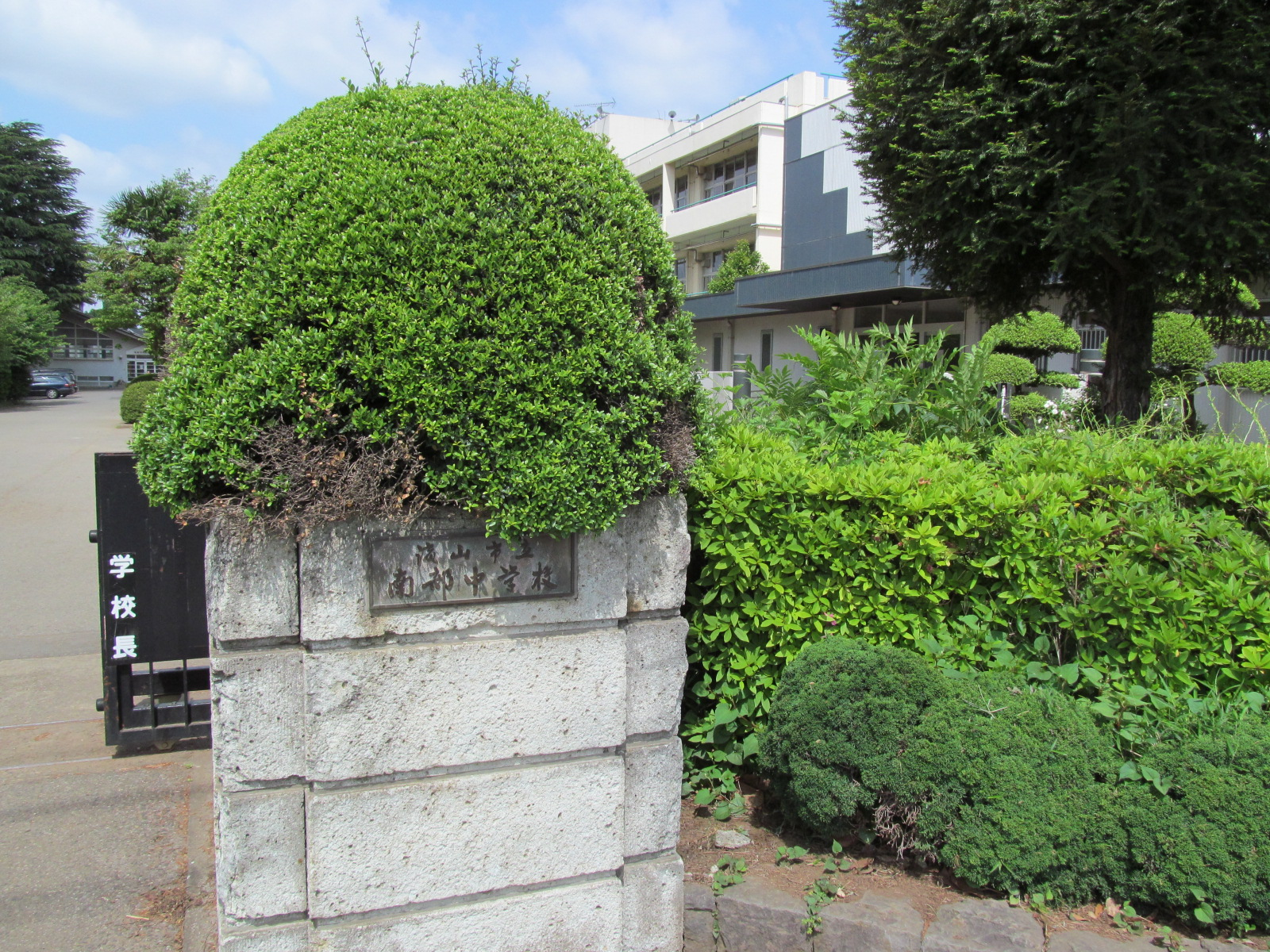 2016年5月15日撮影